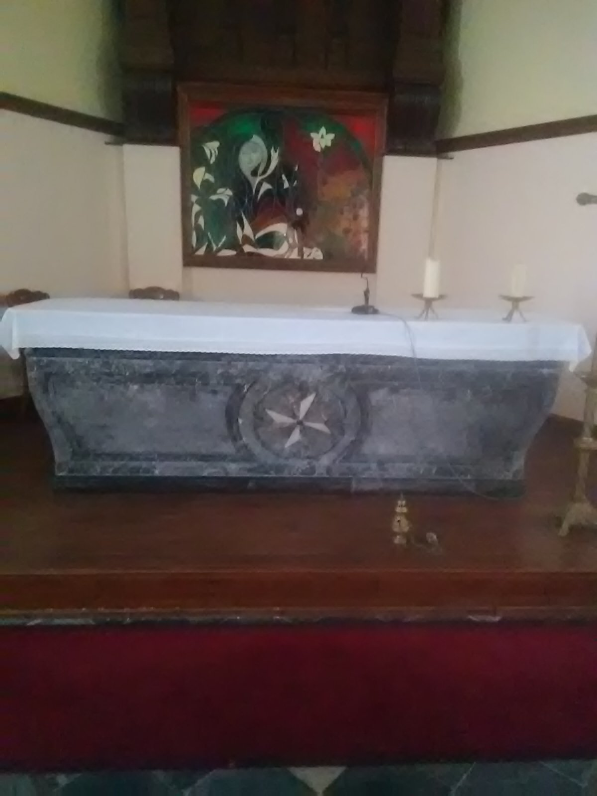 Eglise de Brunémont